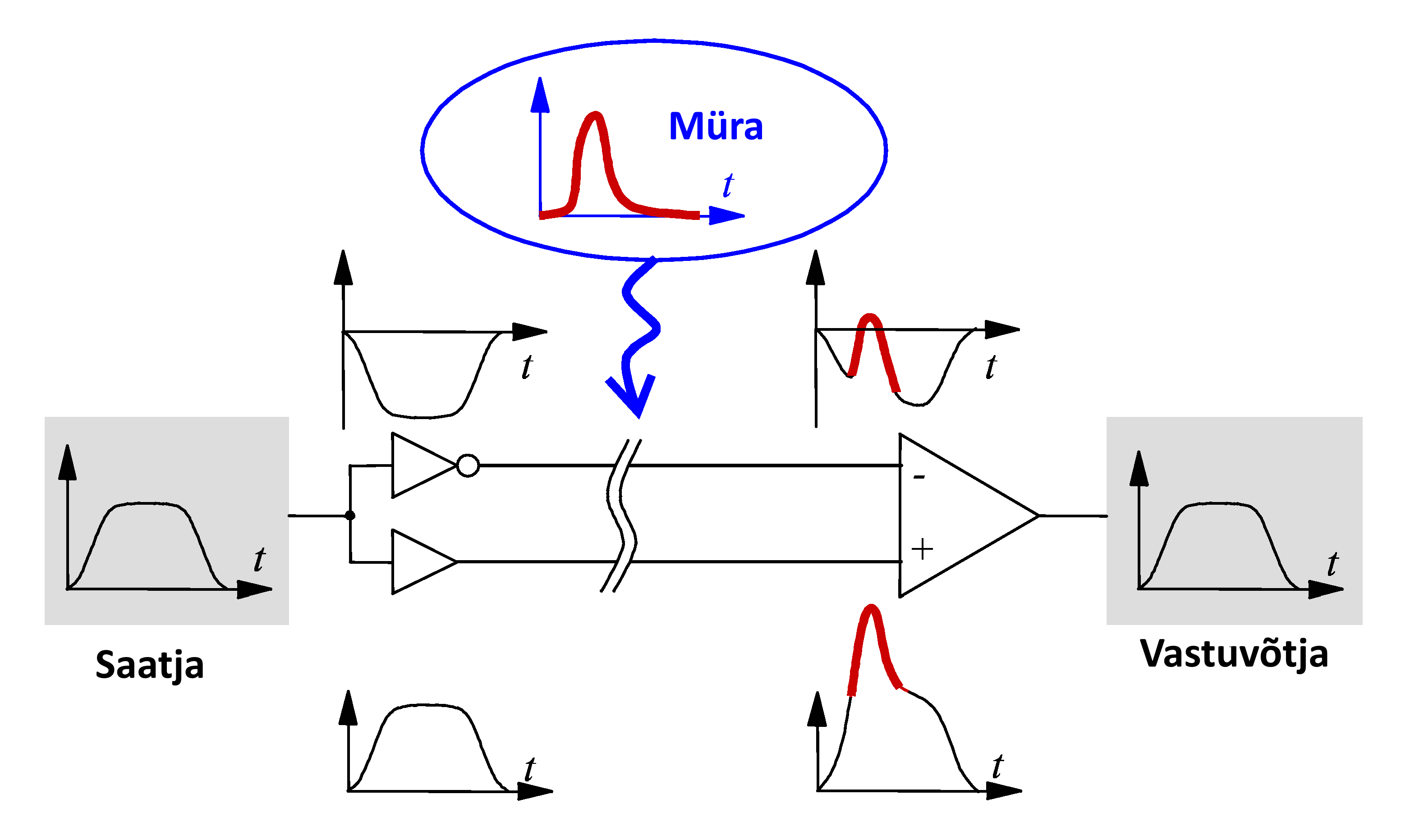 Müra kaotamine differentsiaalsignaali puhul